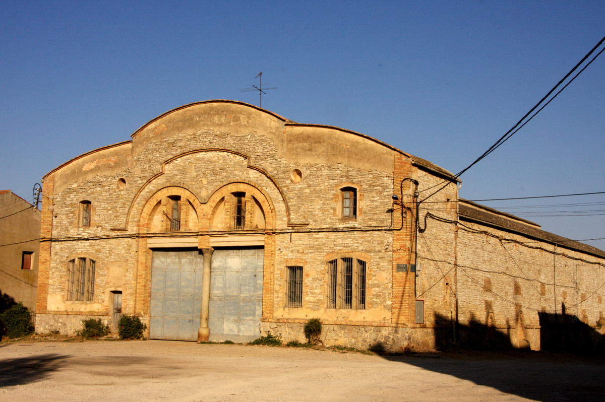 Sindicat agrícola de Sant Guim de Freixenet (la Segarra- Catalunya), obra de Cèsar Martinell.